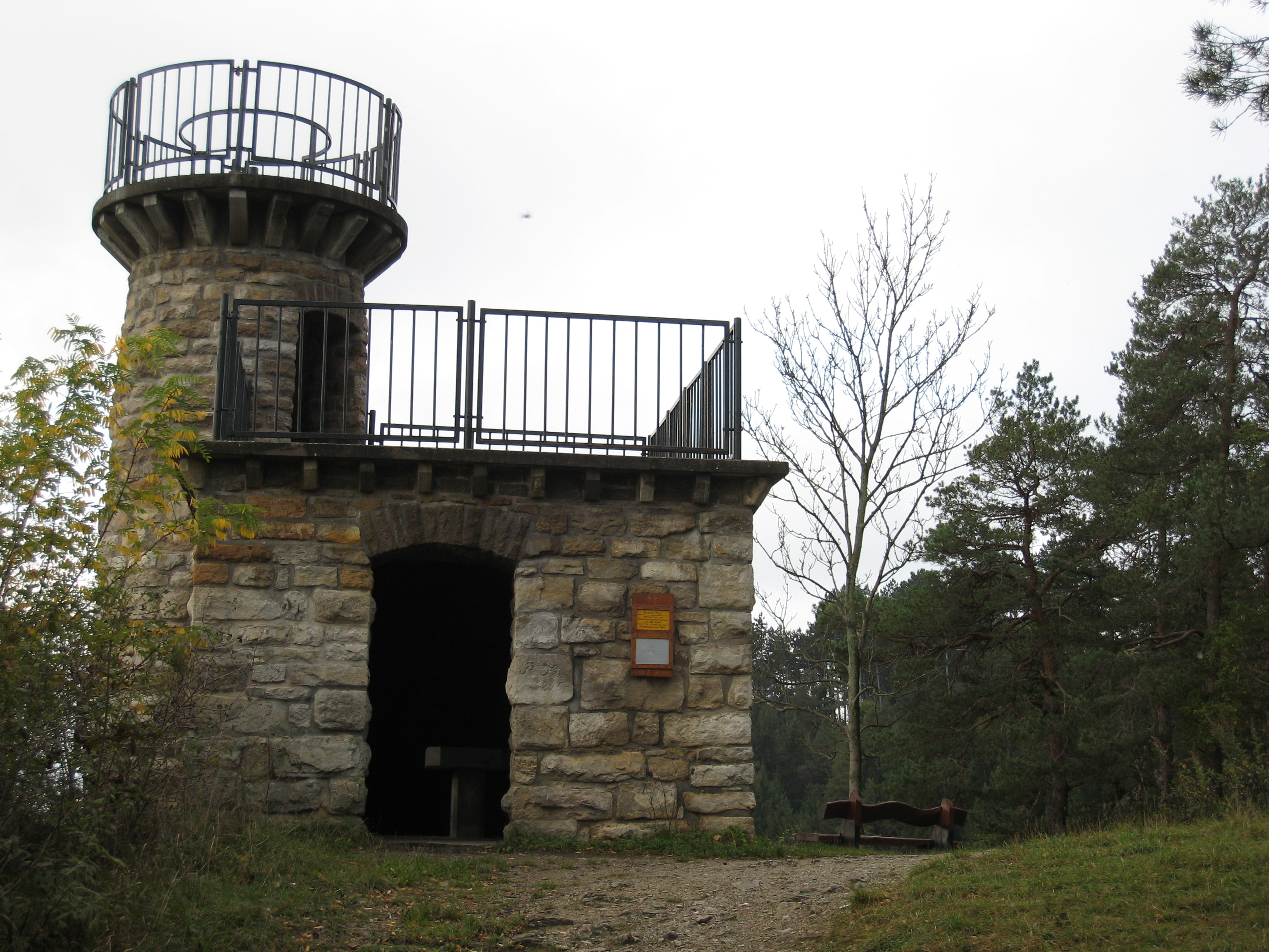 Kreuzchen Arnstadt 1